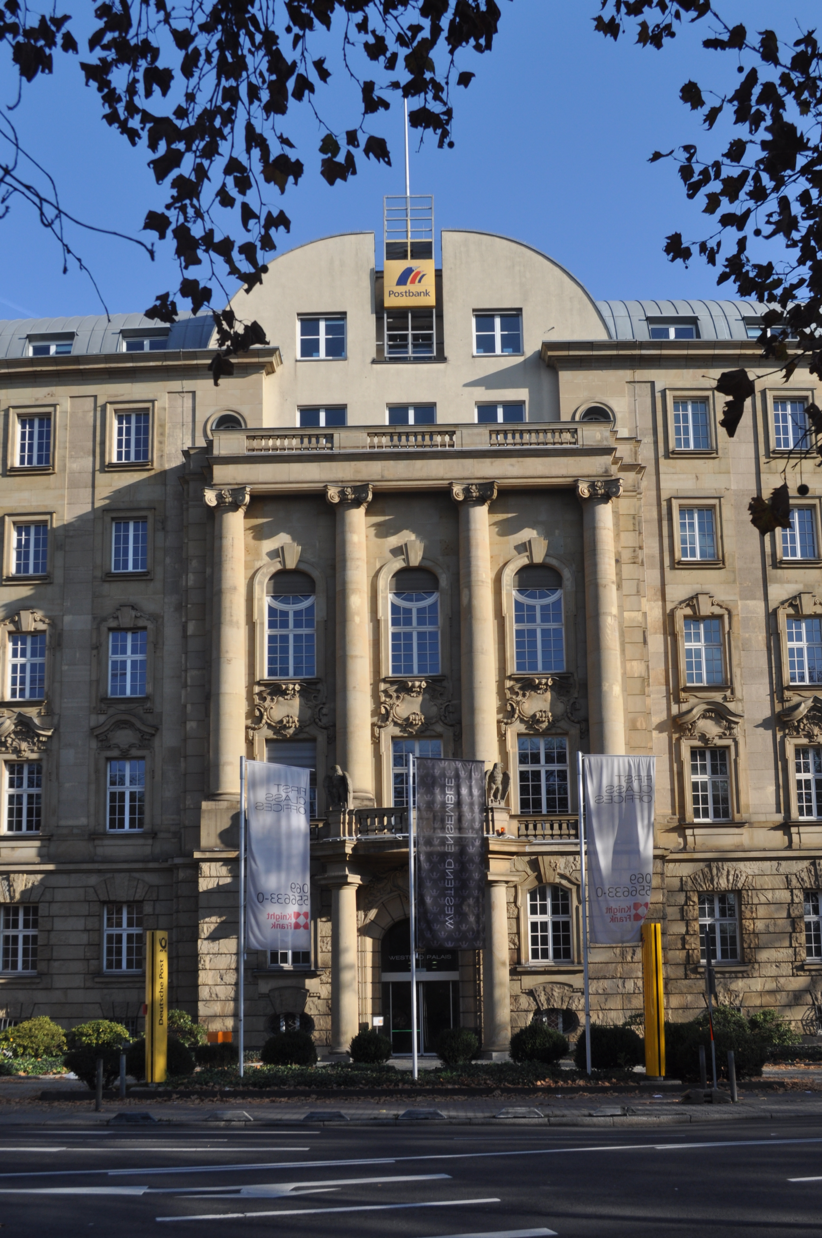 Denkmalgeschütztes Gebäude der ehemaligen Oberpostdirektion in Frankfurt